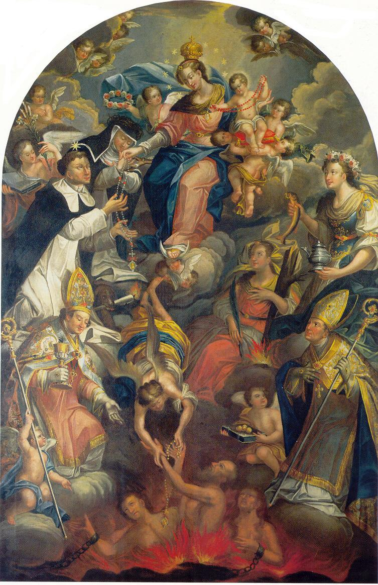 Altarbild des Löwentaler Hochaltars, heute in der Pfarrkirche St. Petrus Canisius in Friedrichshafen